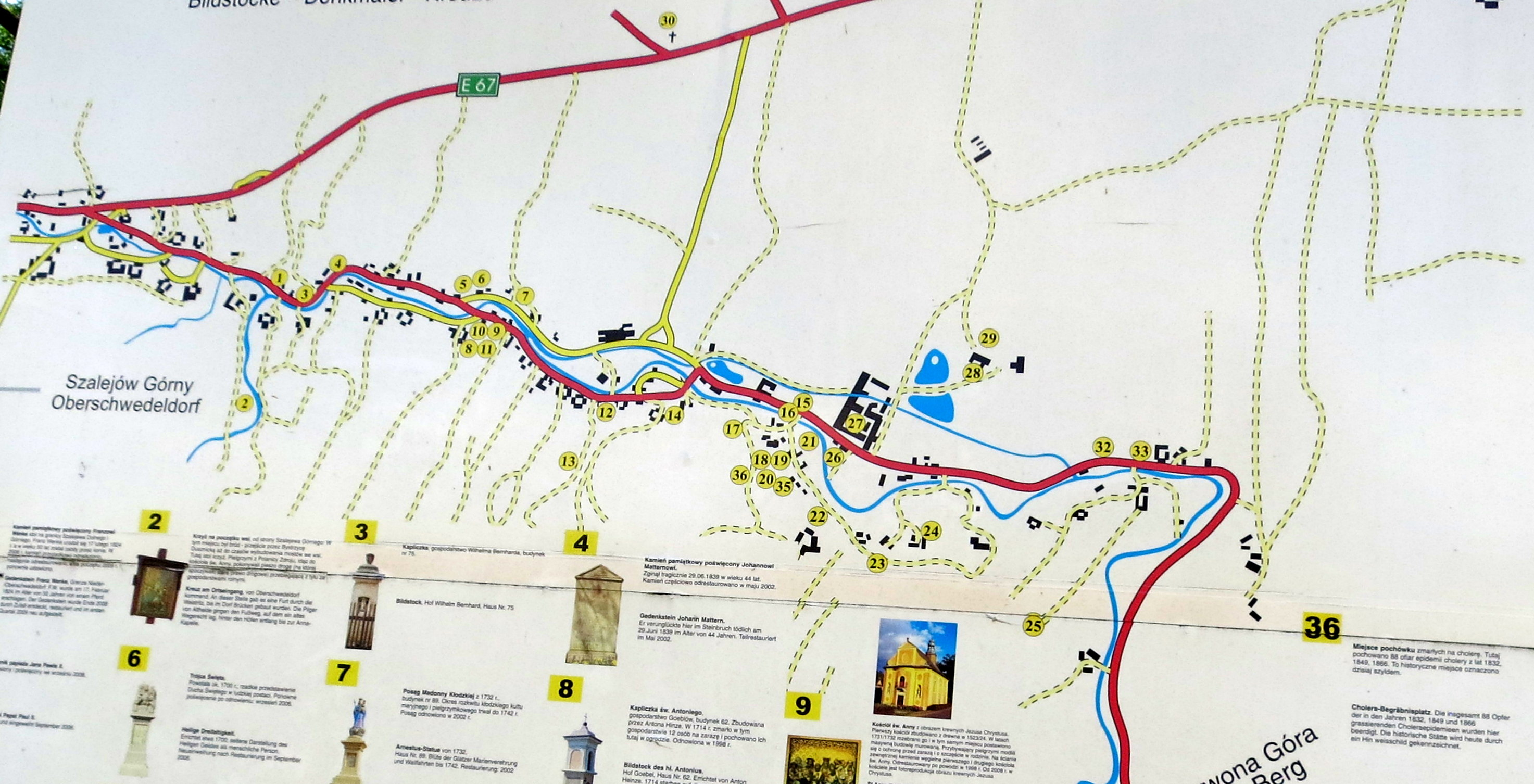 Denkmäler, die zur Tour der Denkmäler in Ober- und Niederschwedeldorf gehören.